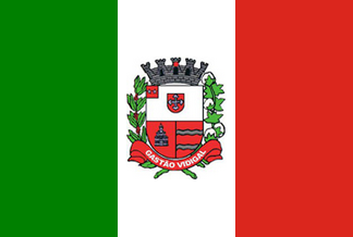 Bandeira de Gastão Vidigal - SP - Brasil.